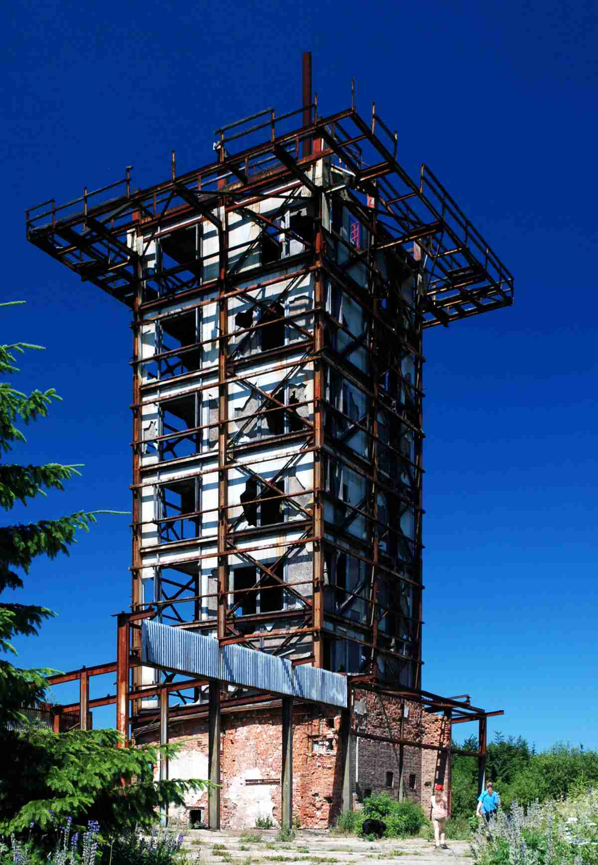 Zbytky vojenské rozhledny na vrcholu kopce Havran